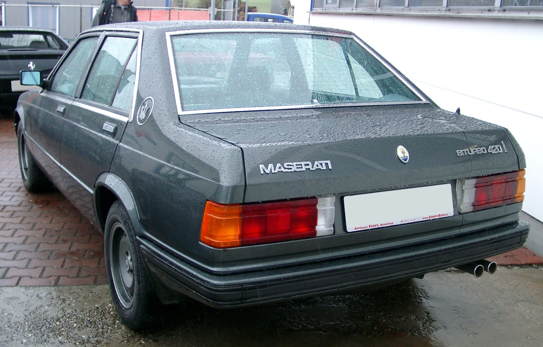 Maserati Biturbo 420i (1986)